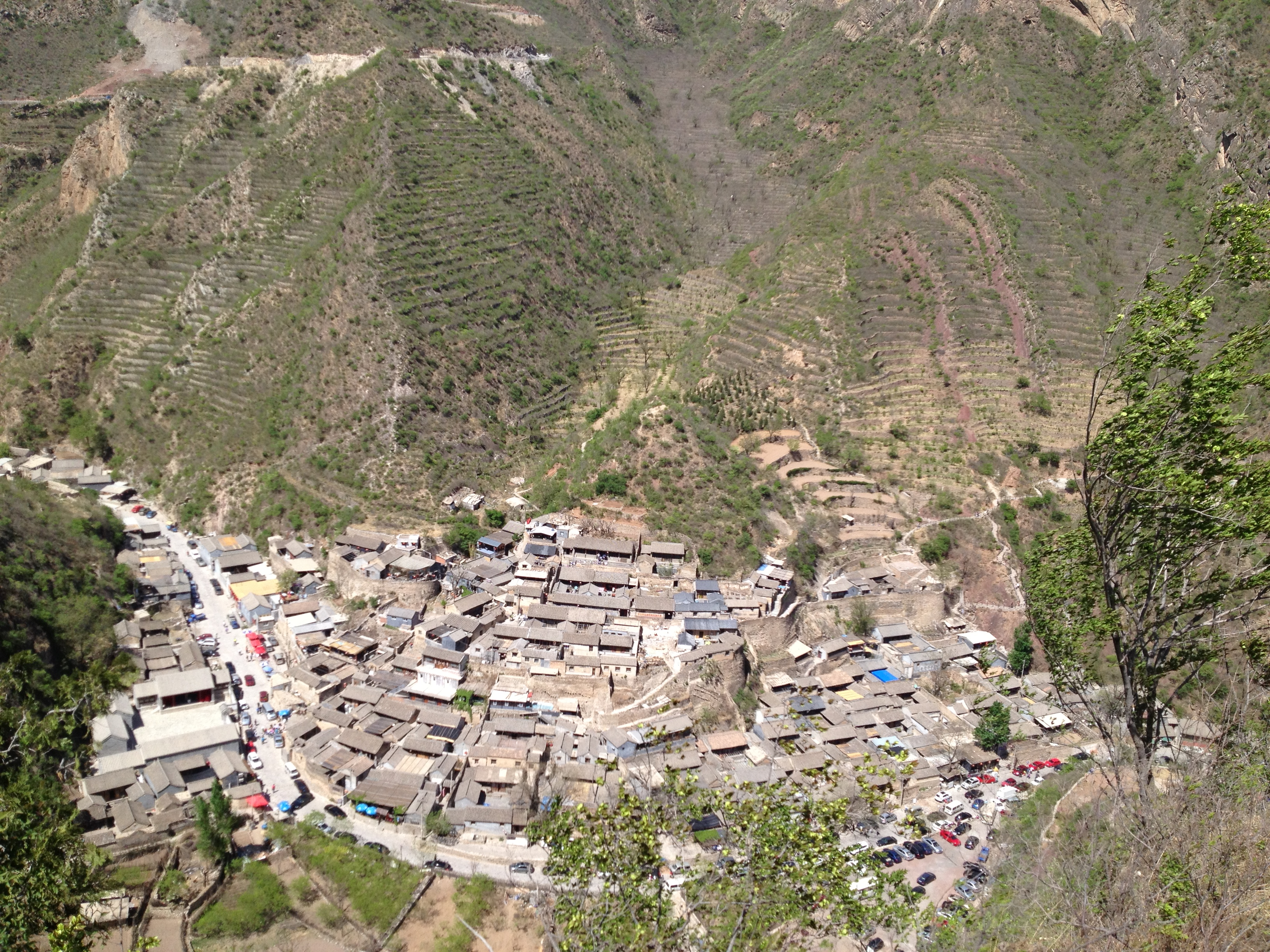 中文（中国大陆）: 北京西郊门头沟区斋堂镇爨底下村